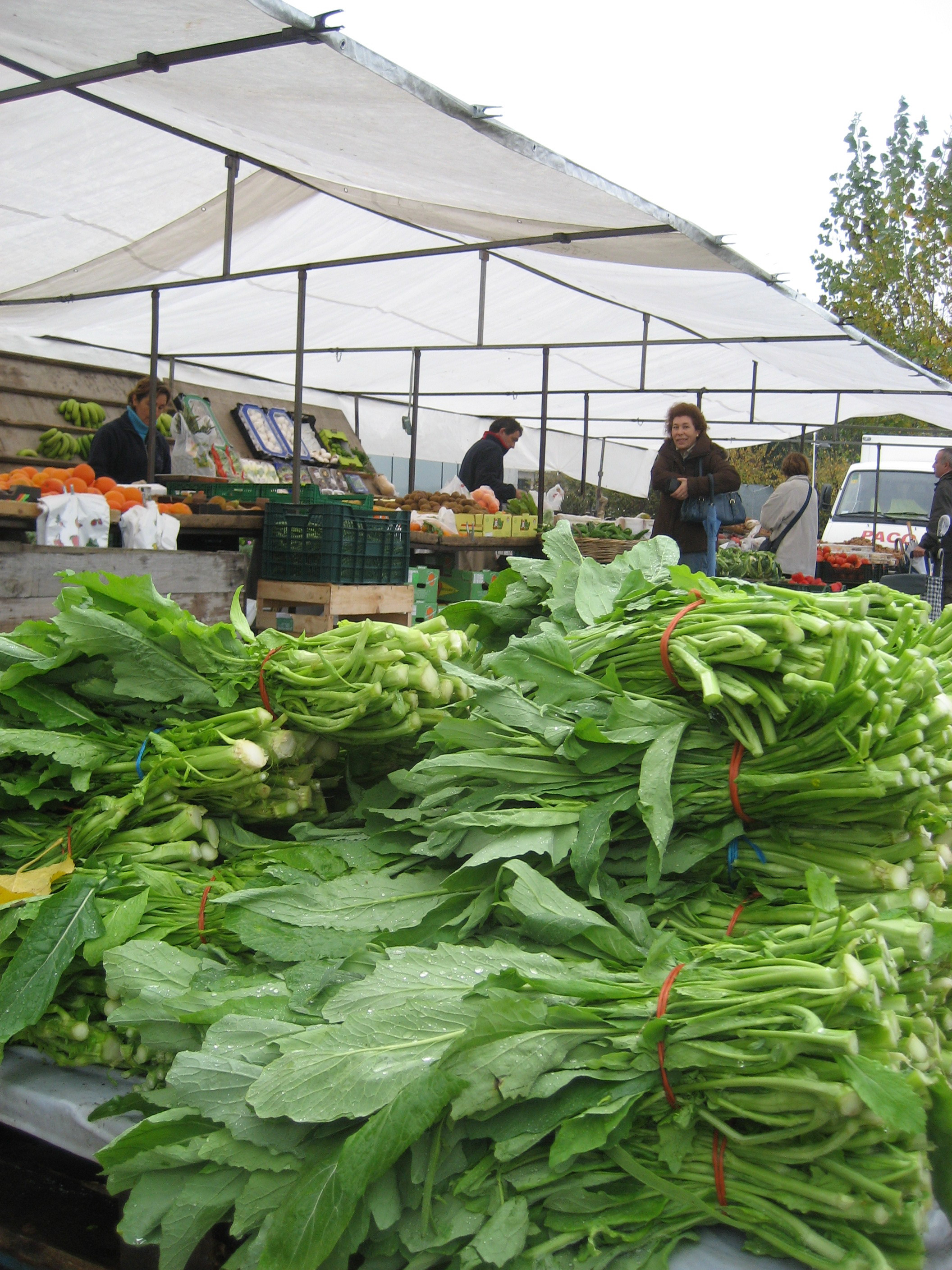 Grelos no mercado, A Pobra do Caramiñal